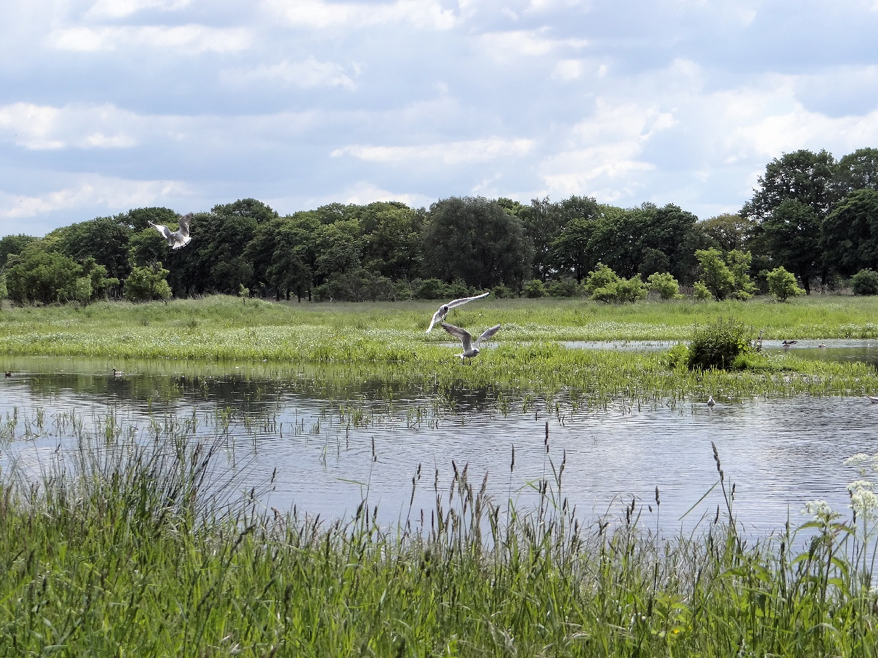 Möwen über den Teichen in den Rieselfeldern.